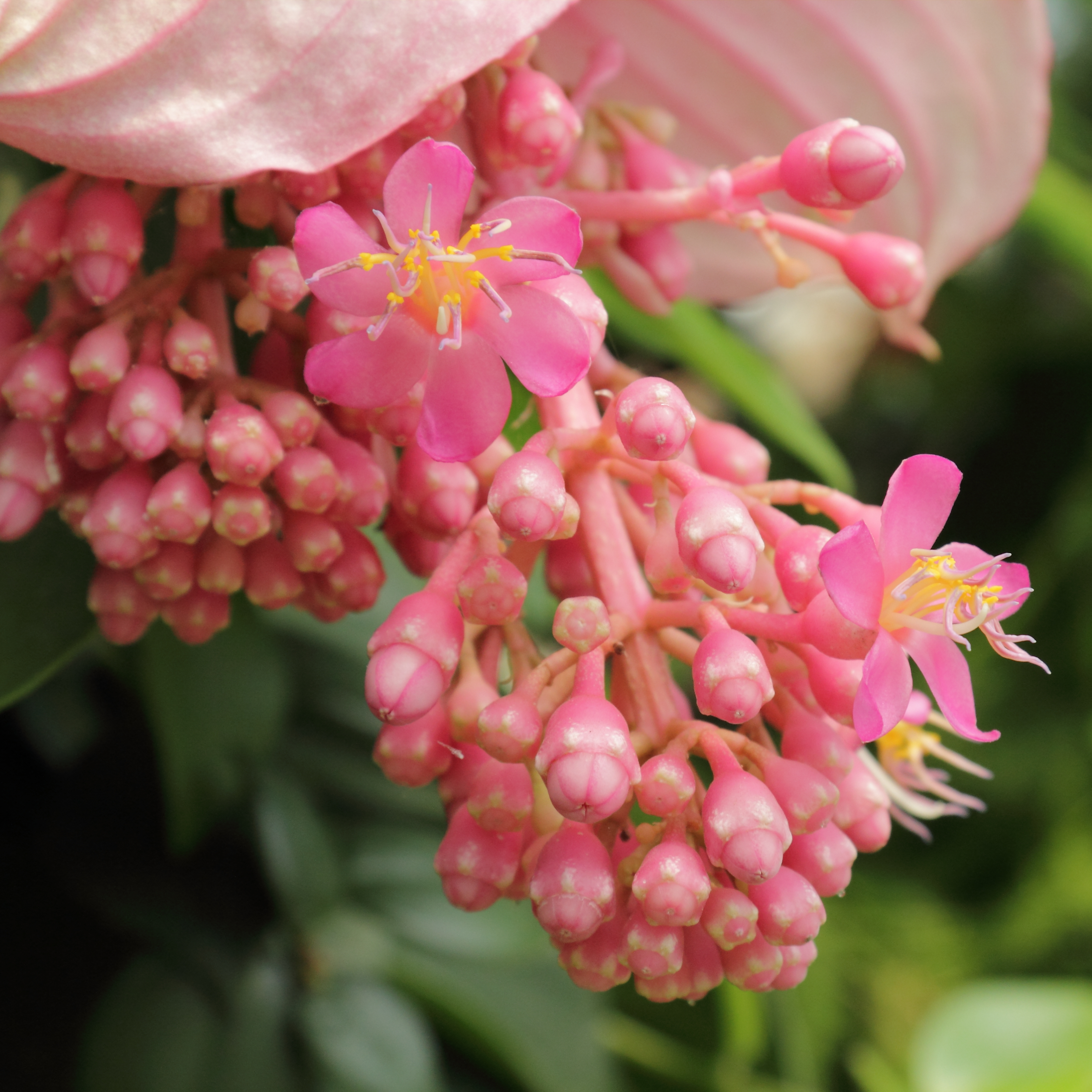 Medinilla magnifica, identifierad med hjälp av befintlig skylt vid Kew Gardens, London.